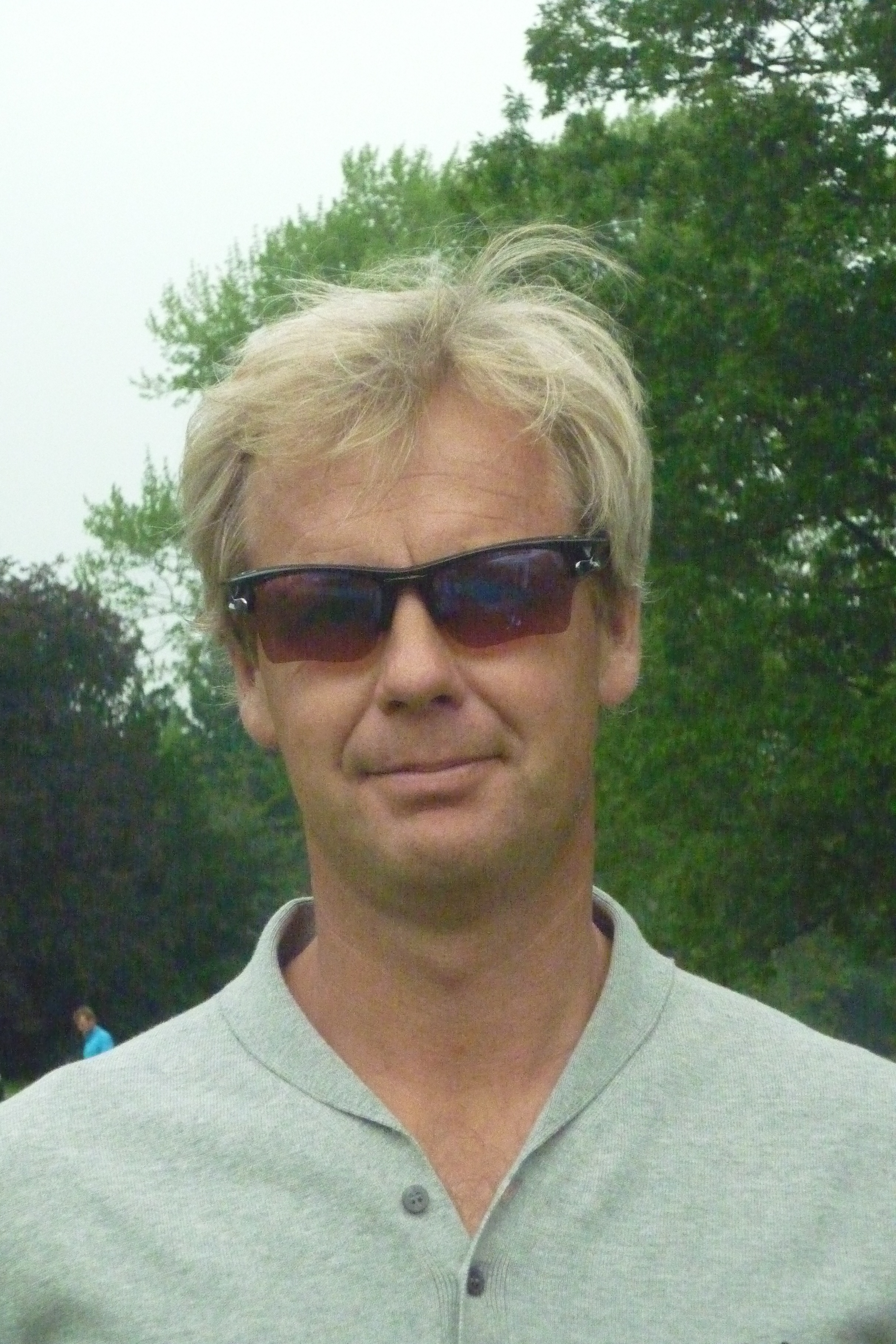 Klas Eriksson op de Telenet Trophy 2012